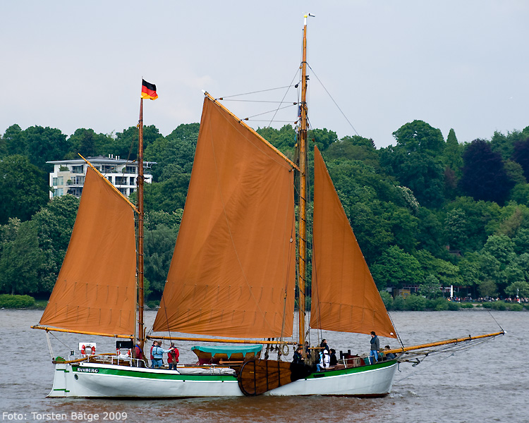 Der Besan-Ewer Johanna ist ein stählerner Frachtewer mit zwei Masten, der 1903 in Elmshorn auf der Werft Jos. Thormählen gebaut wurde. Die Johanna repräsentiert die ehemalige Flotte kleiner Frachtsegler, die bis ins 20. Jahrhundert hinein Waren zwischen Hamburg und den niederelbischen Marschen transportiert haben. Aufgenommen während der Einlaufparade des 820. Hamburger Hafengeburtstages.